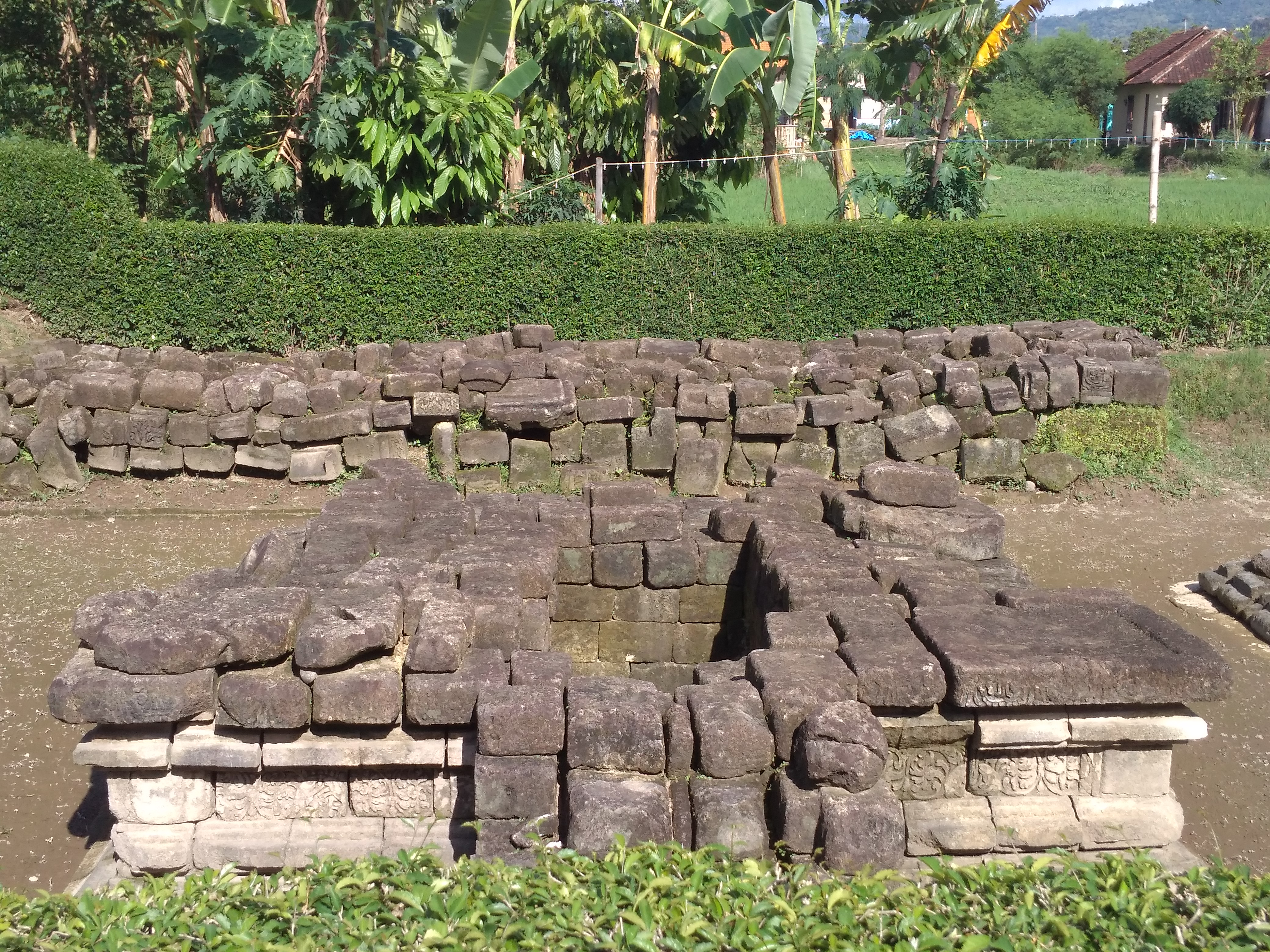 Candi Gampingan dari arah depan (barat)